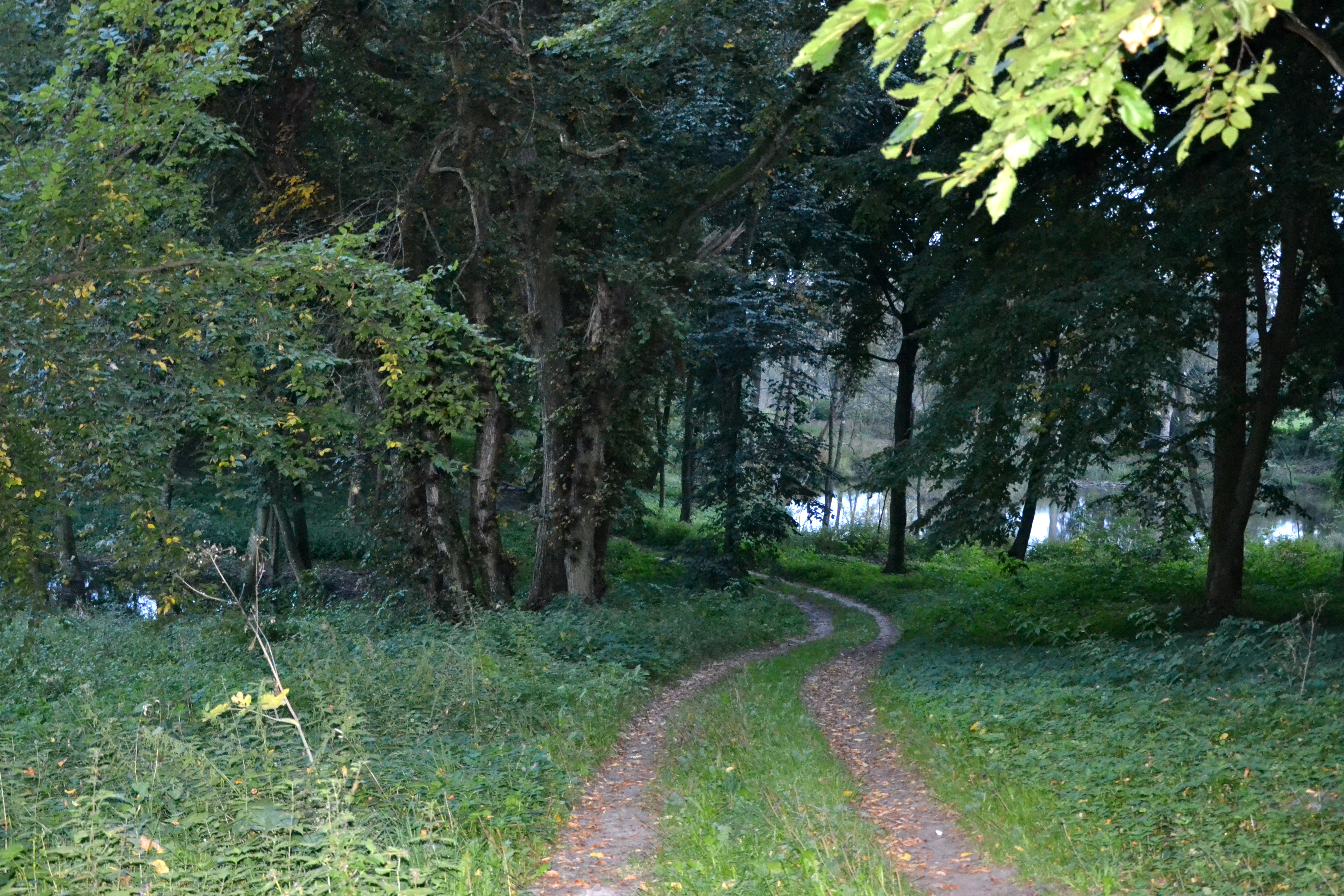 Narost - park dworski